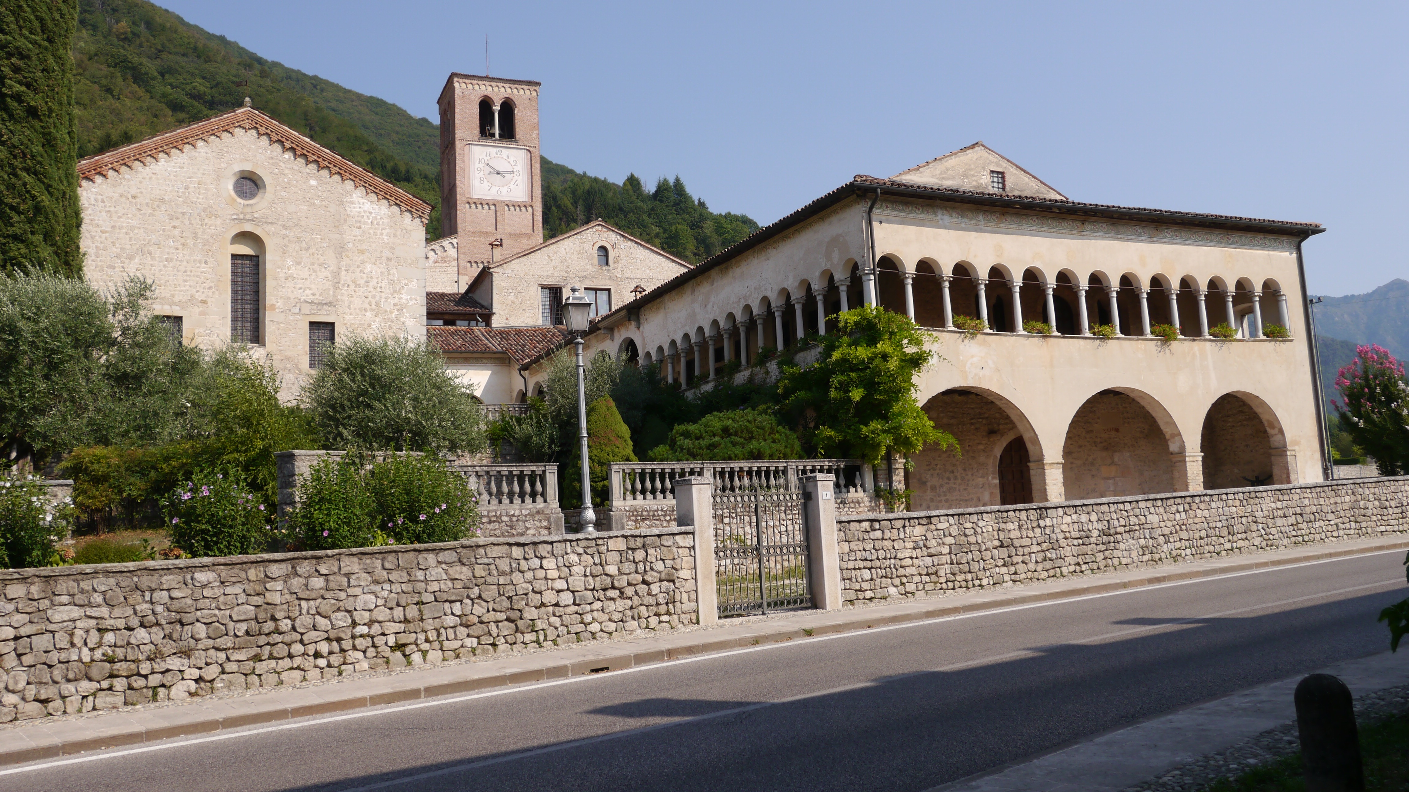 Antica foresteria del monastero detto anche "chiostrino dell'Abate". Circa 1500